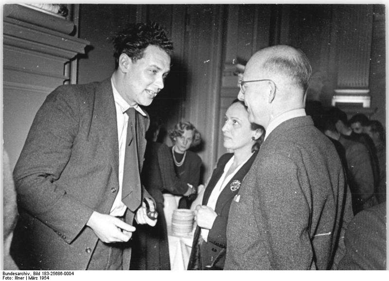 Zentralbild Illner 8.3.1954 Konferenz junger Autoren in Leipzig Im Beisein von 400 Nachwuchsschriftstellern wurde am 6. und 7. März 1954 in Leipzig die erste Konferenz junger Autoren unserer Republik durchgeführt. Die Konferenz erarbeitete in den beiden Konferenztagen Vorschläge zur planmässigen wissenschaftlichen Förderung junger Autoren. Diese Vorschläge werden dem IV. deutschen Schrfitstellerkongress zugeleitet werden. UBz: Links: der westdeutsche Autor Gotthold Gloger im Gespräch mit C. F. Weißkopf und Alex Wedding.